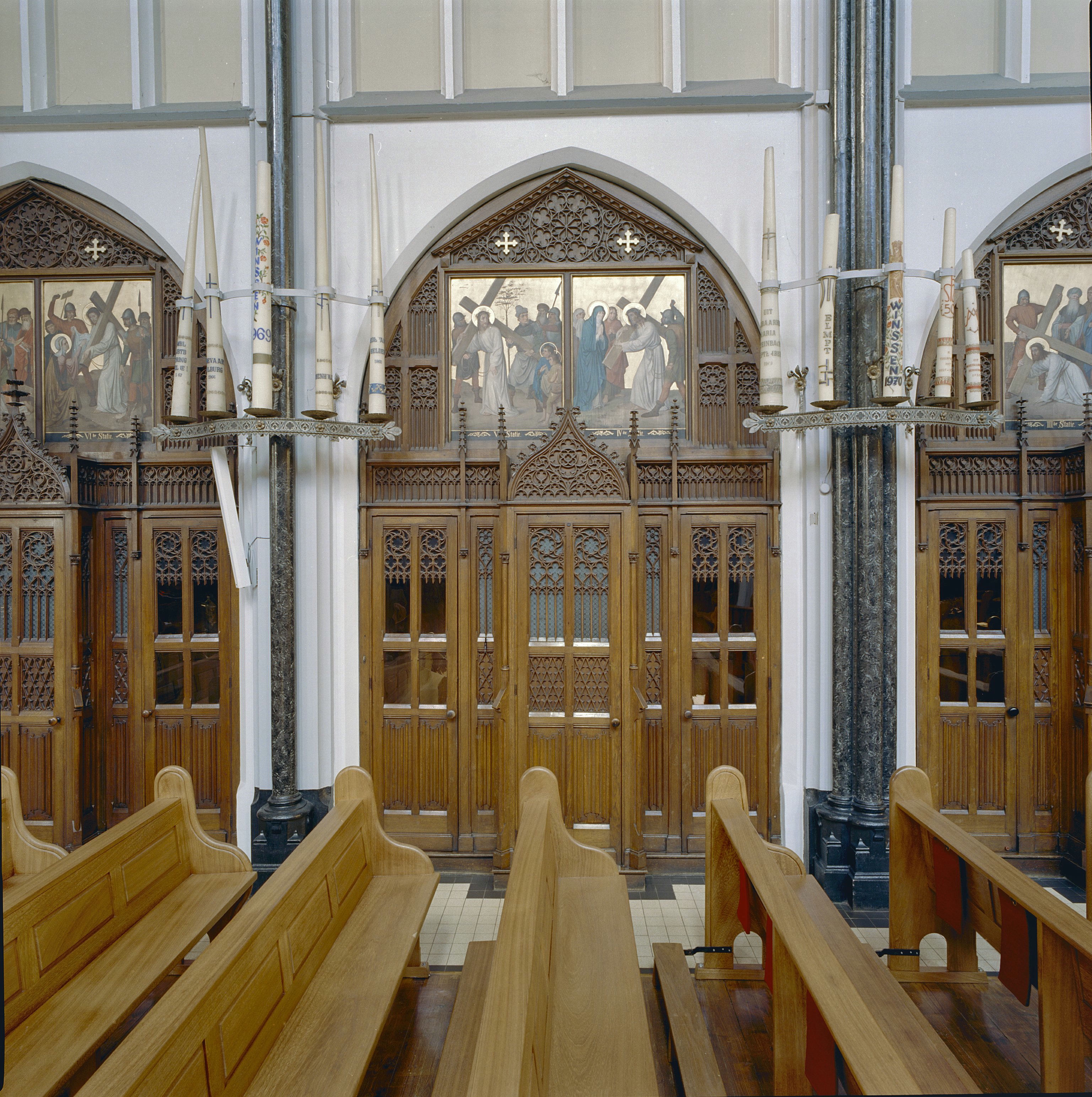 Kruiswegpark: Interieur, biechtstoelen